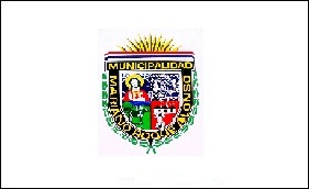 Bandera de la ciudad de Mariano Roque Alonso, Paraguay